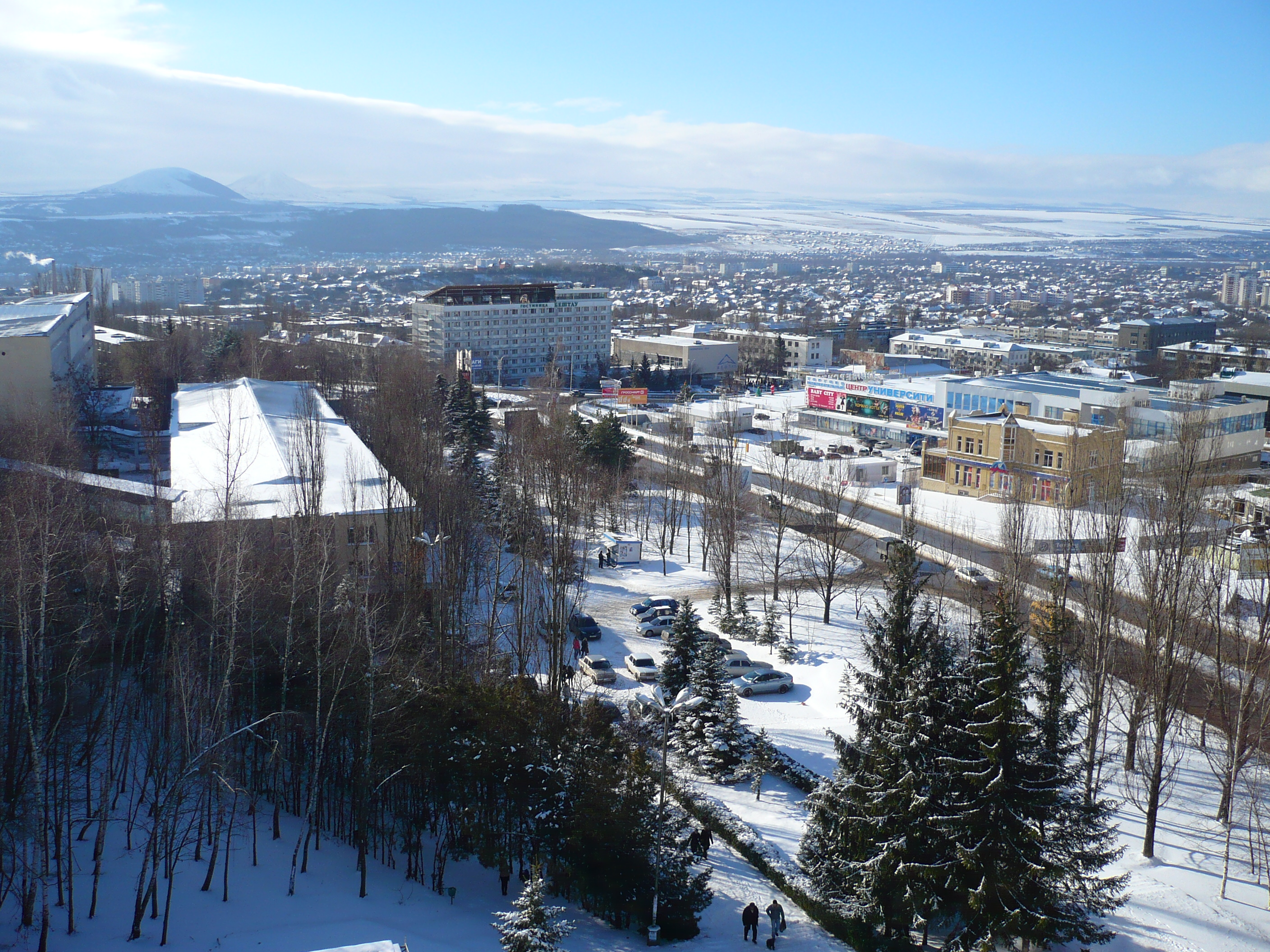 «Город Пятигорск 2007 год, зима»